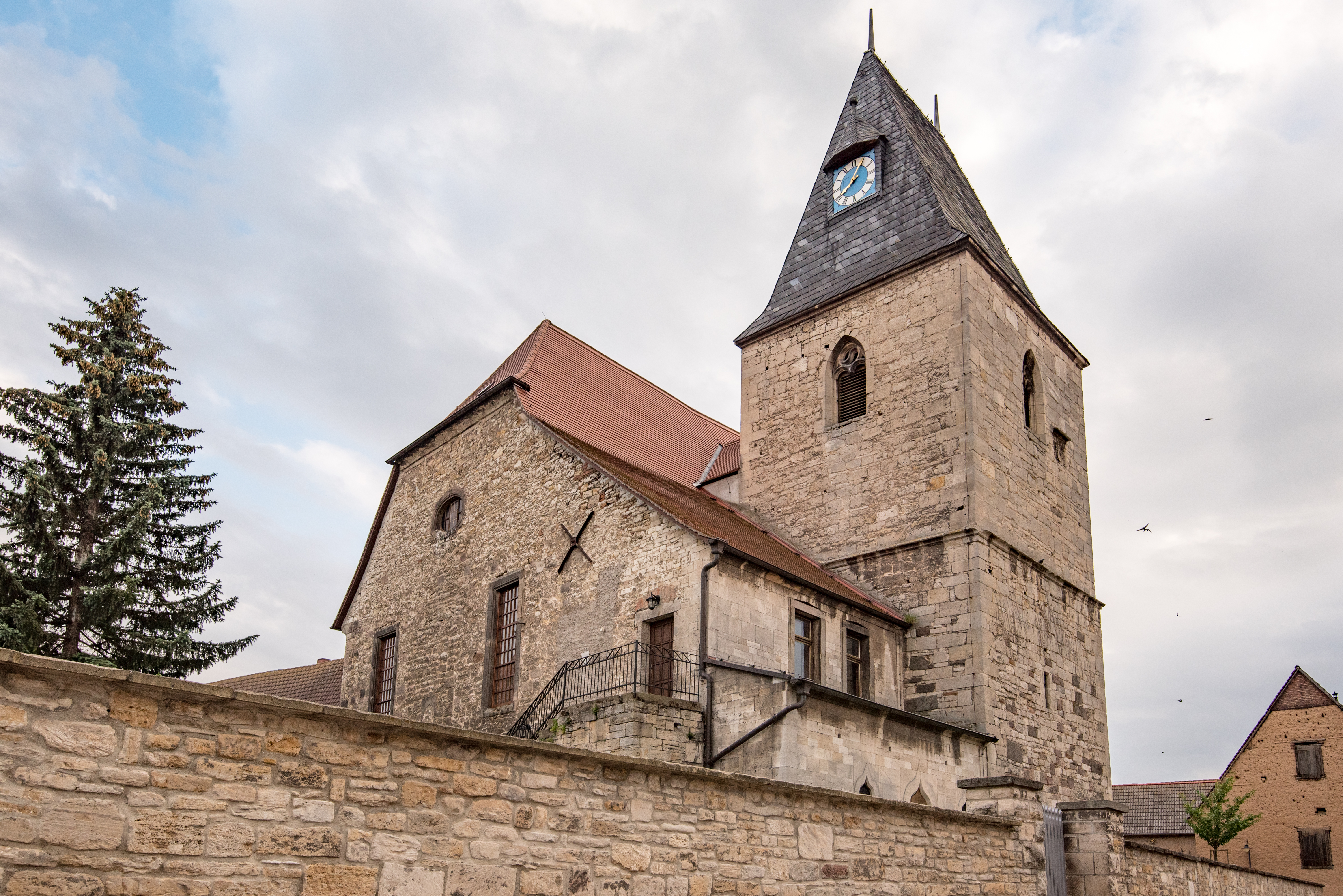 Gleina, Kirche